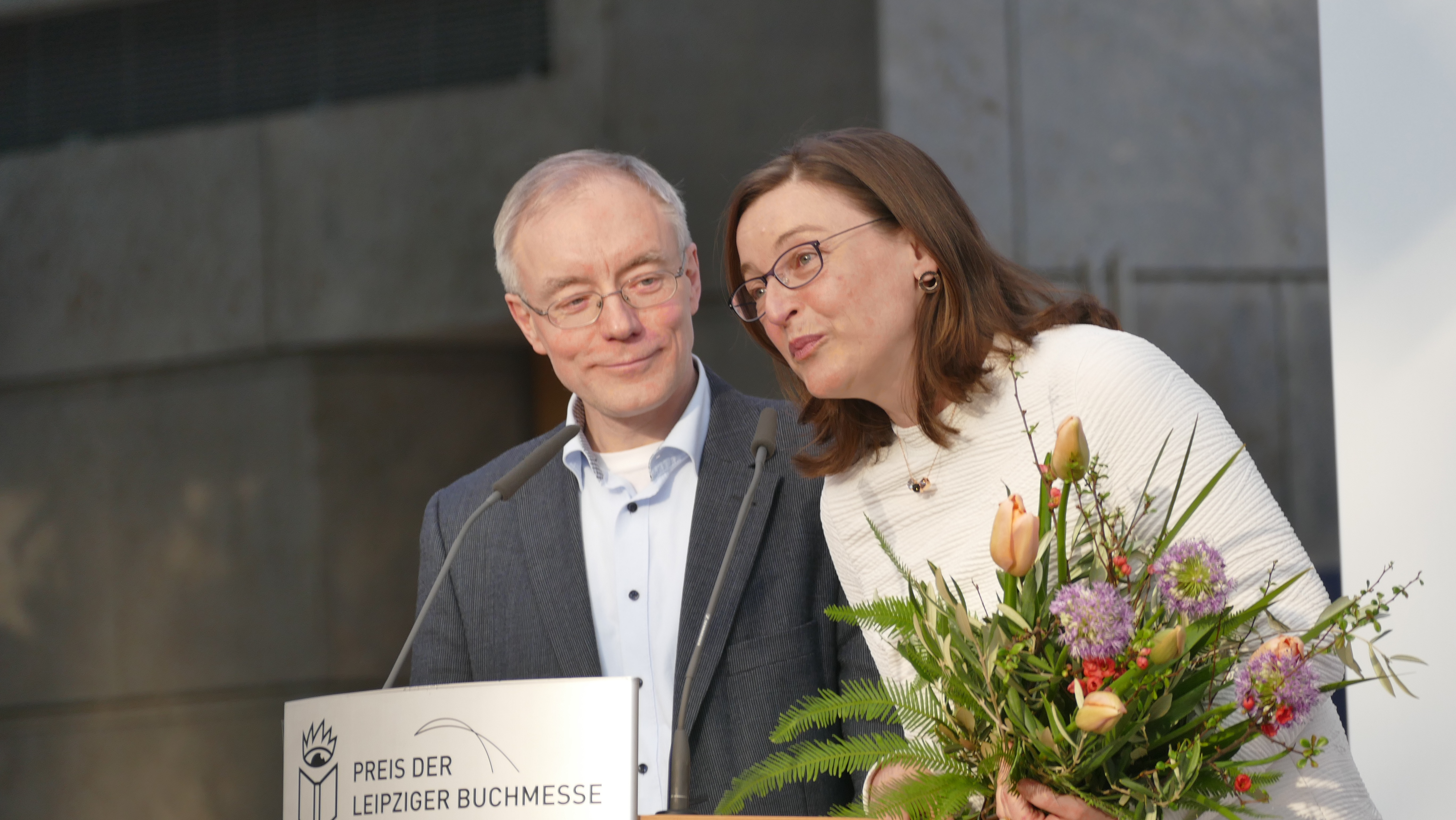 Juri Durkot und Sabine Stöhr: Preis der Leipziger Buchmesse 2018 - für ihre Übersetzung von Serhij Zhadan: "Internat"